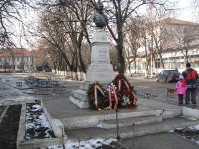 Bustul lui Alexandru Ioan Cuza